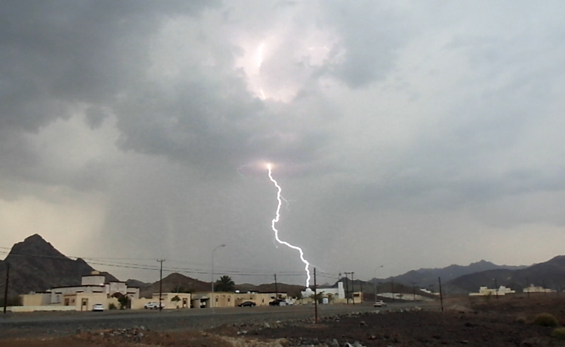 صورة للأمطار التي تهطل على بلدة الوقبة